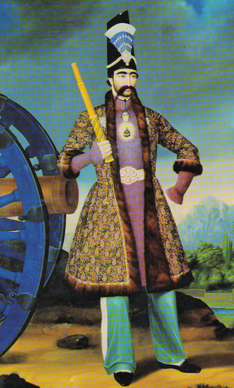 این اثر هنری بخاطر به این دلیل که اولین انتشارش قبل از ۱ ژانویهٔ ۱۹۲۳ روی داده است هم‌اکنون در سراسر جهان در مالکیت عمومی قرار دارد و استفاده از آن آزاد است. بنابراین تکثیر آن در ایالات متحده آمریکا، آلمان و بسیاری کشورهای دیگر آزاد است.